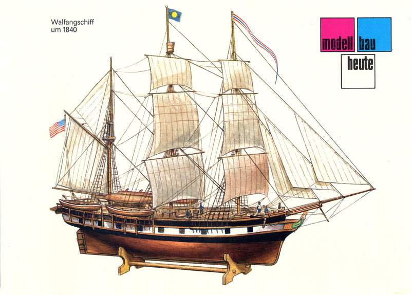 Rücktitelgrafik der mbH 3/88 zum Modellbaubeitrag Amerikanischer Segelwalfänger, Illustration von Georg Seyler, Berlin